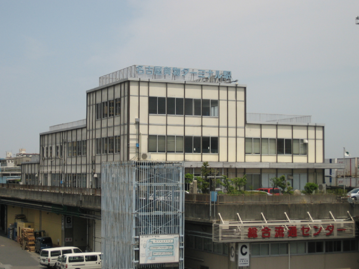 JR貨物、名古屋貨物ターミナル駅